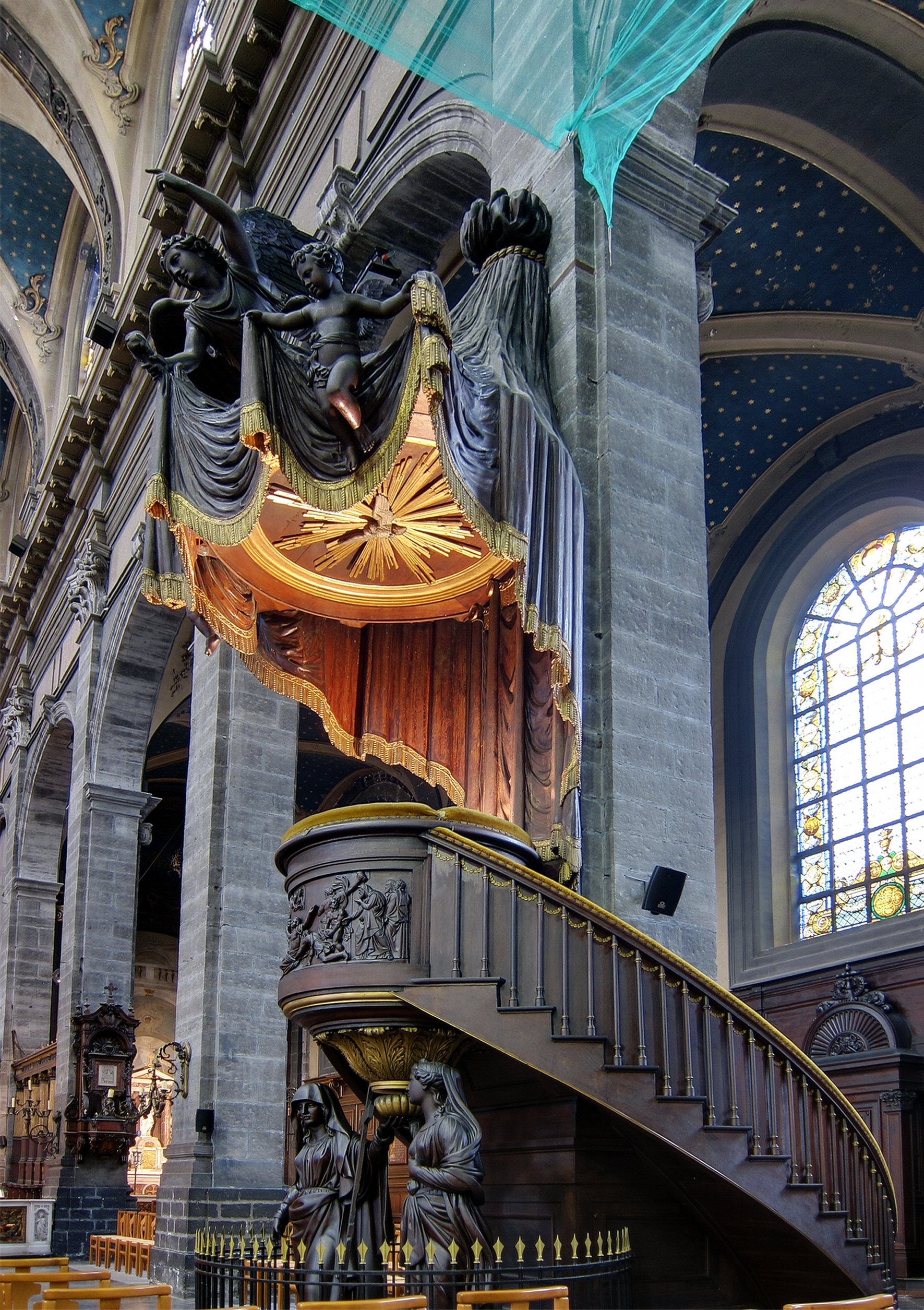 La chaire de l'Église Saint-Étienne de Lille.